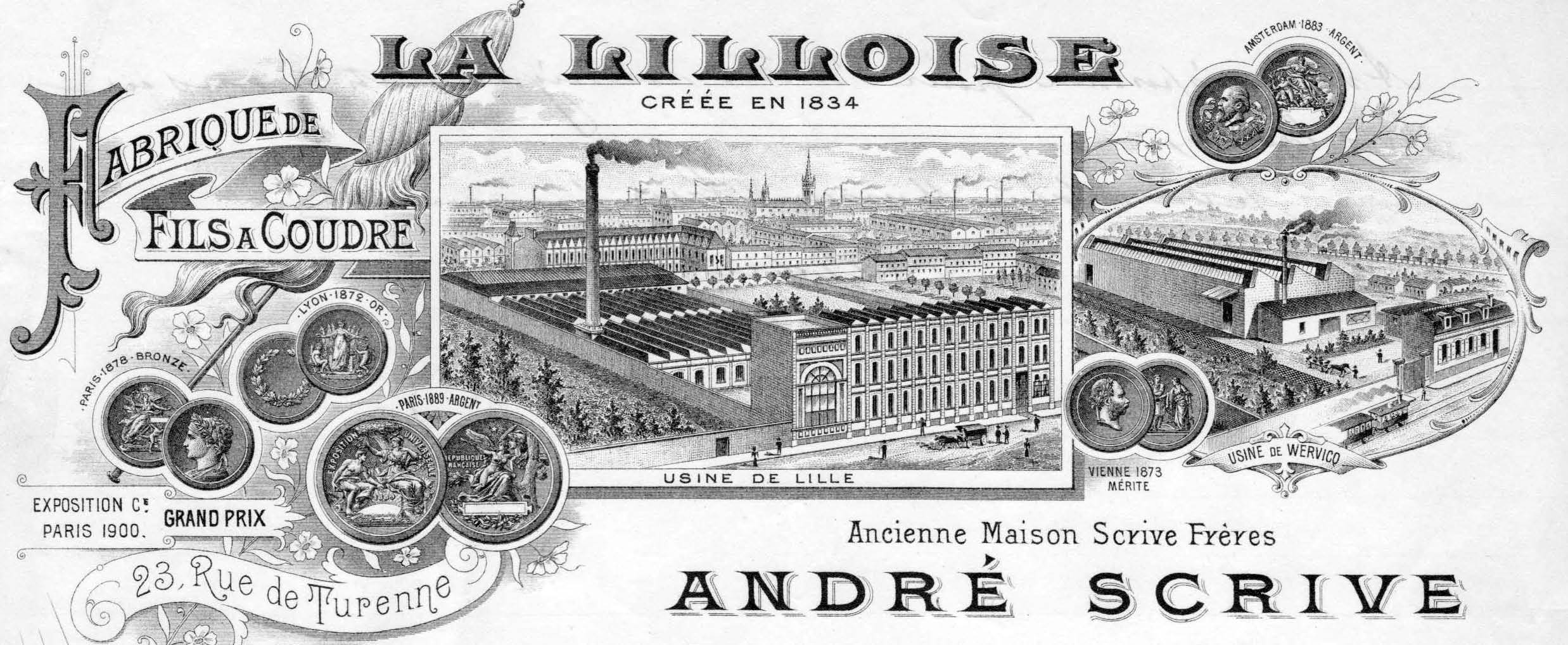 Gravure d'en-tête du papier de correspondance de la Société La Lilloise/André Scrive